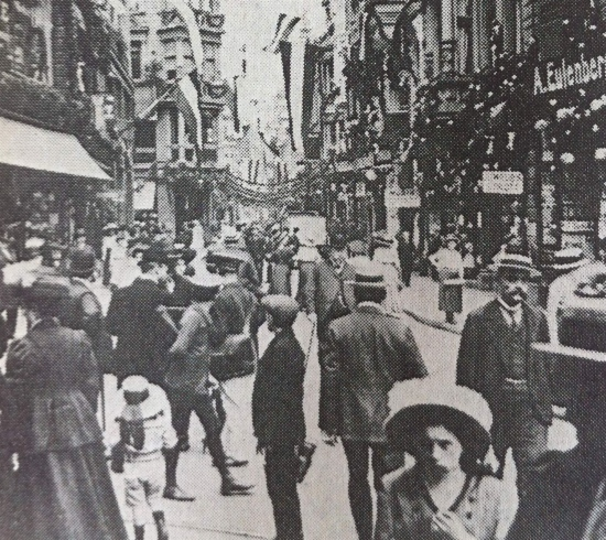 Impression der Poststraße in Elberfeld, heute Wuppertal.